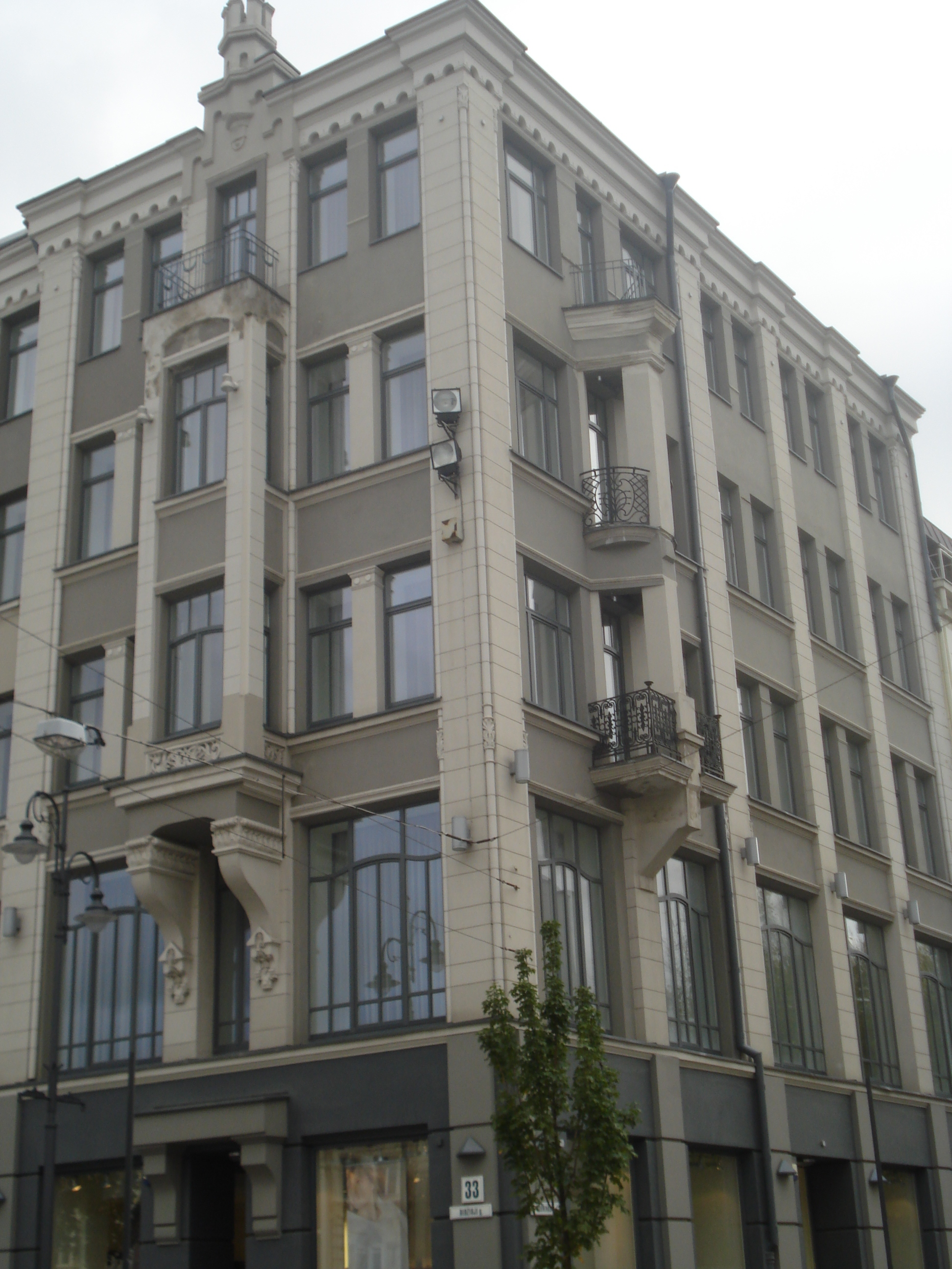 Escada. Didžioji g. 33 / Rūdninkų g. 2 in Vilnius